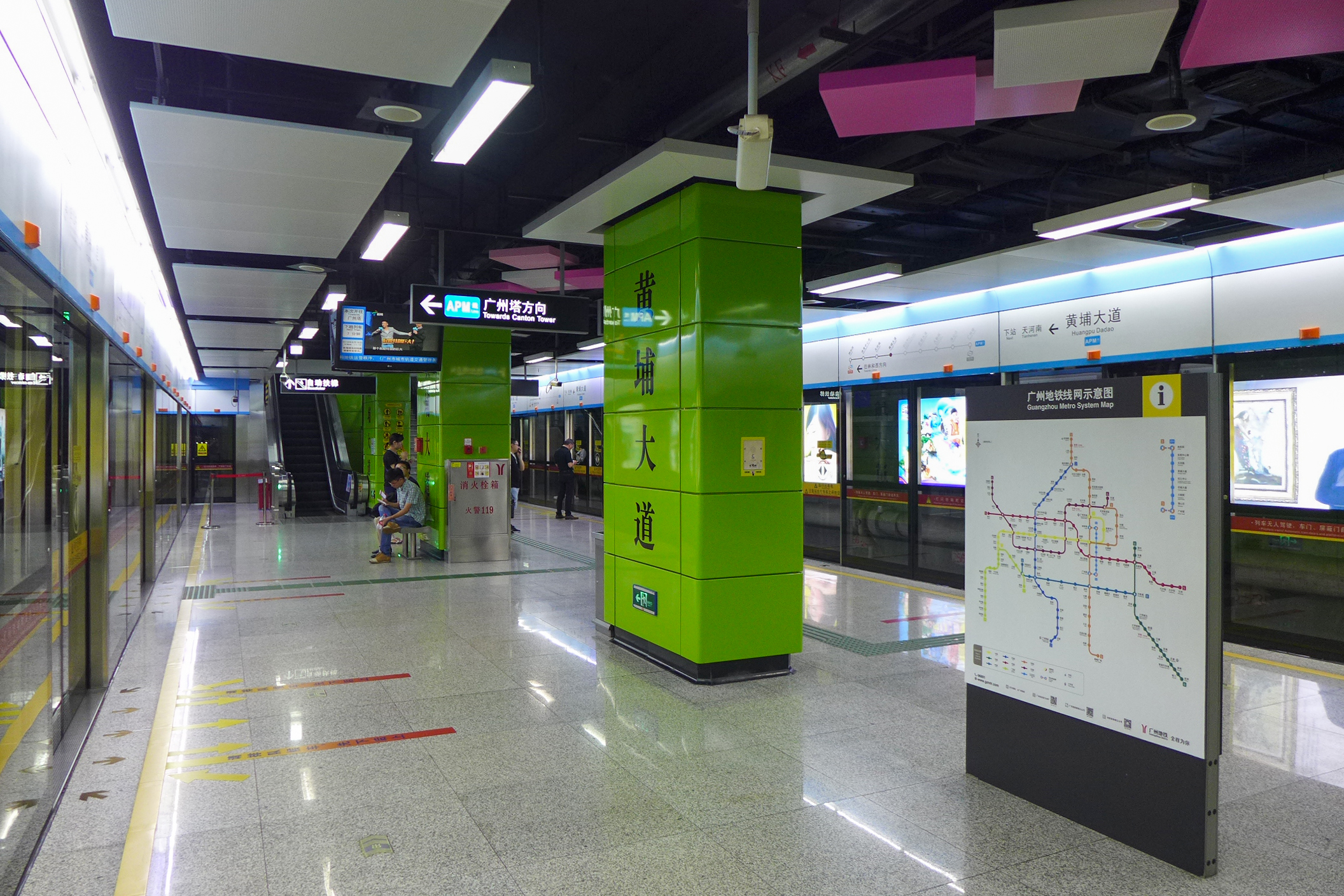 Huangpu Dadao Station